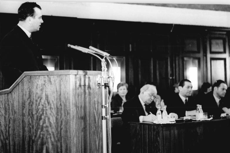 Zentralbild Tele-Koch 25.3.1970 Merseburg: Staatsrat der DDR zu seiner 23. Sitzung zusammengetreten. Über die Wissenschaftsorganisation der chemischen Industrie berät der Staatsrat der DDR auf seiner 23. Sitzung, die am 25.3.70 in Merseburg begonnen hat. Minister Günther Wyschofsky während seines Berichtes vor dem Staatsrat.